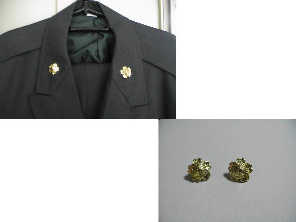 陸曹候補者き章（甲・旧制一般陸曹候補学生採用隊員用）平成13年度新隊員教育（一般曹候補学生前期課程）教育の営内点検にて撮影